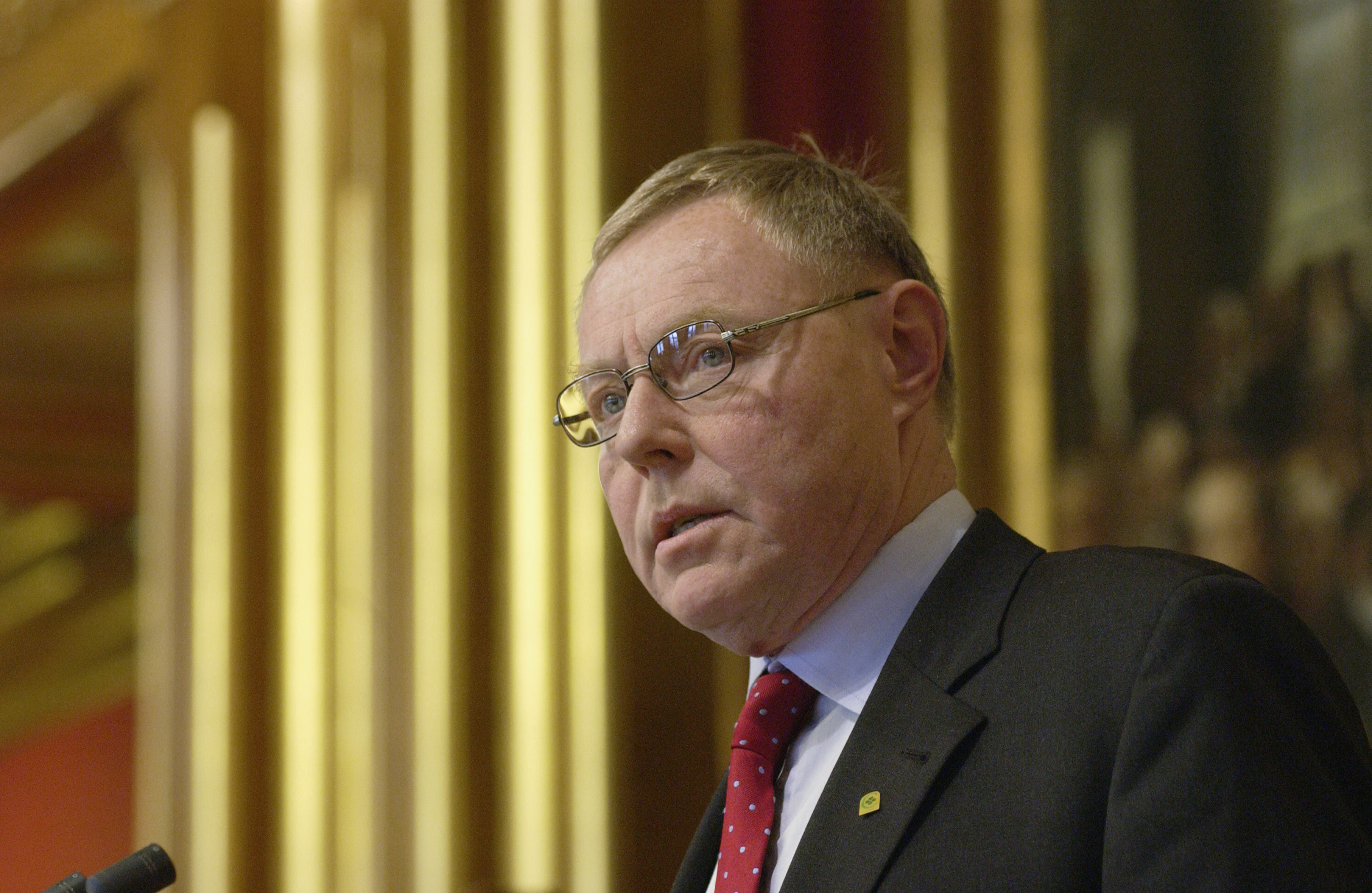 Agne Hansson, Sverige (Bilden är tagen vid Nordiska rådets session i Oslo, 2003)